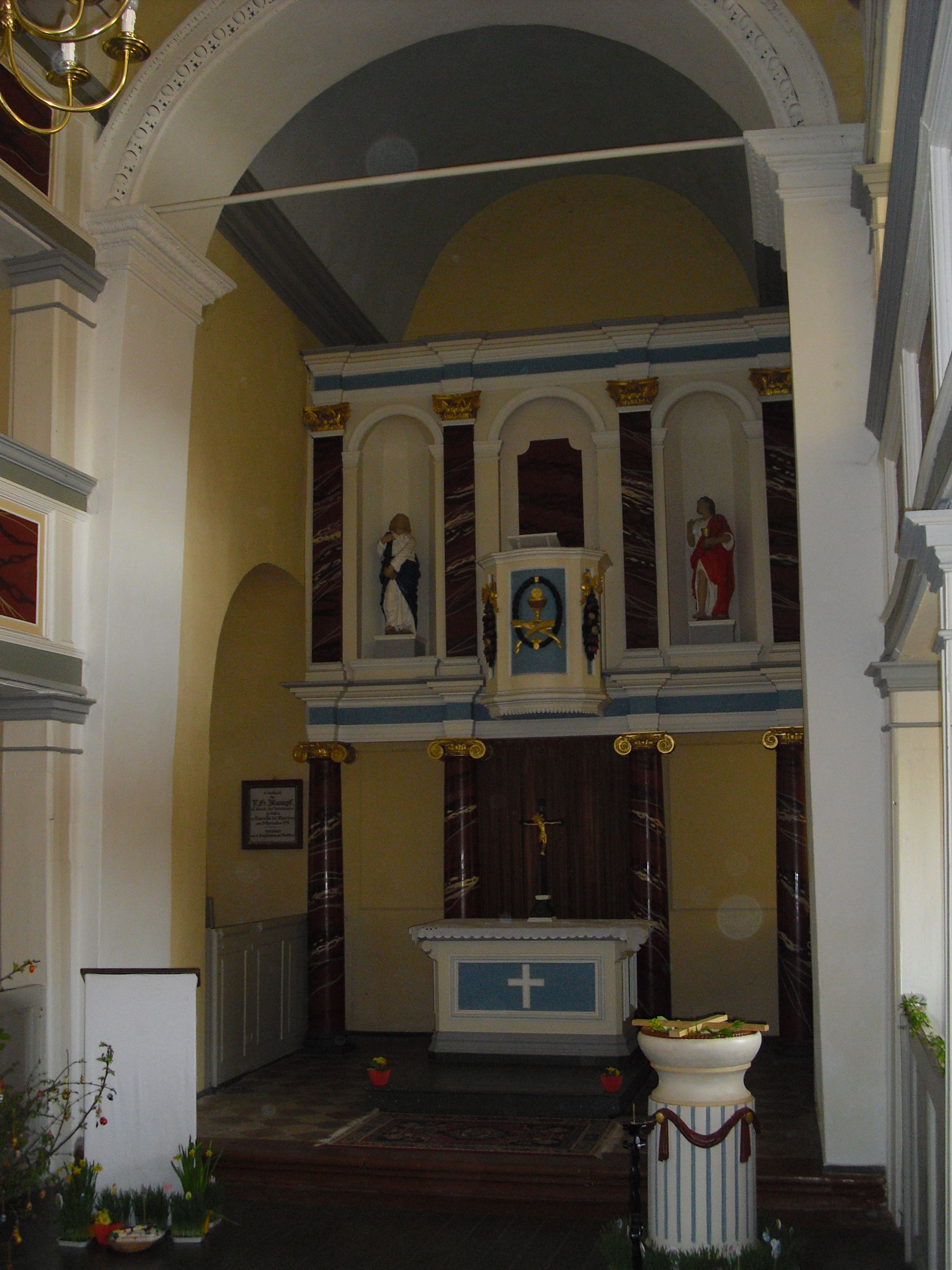 Altarraum der Marienkirche Mattstedt